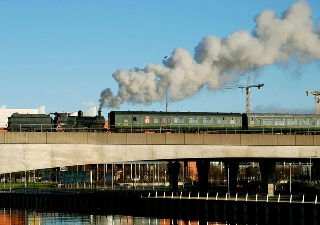 Santa steam, Belfast